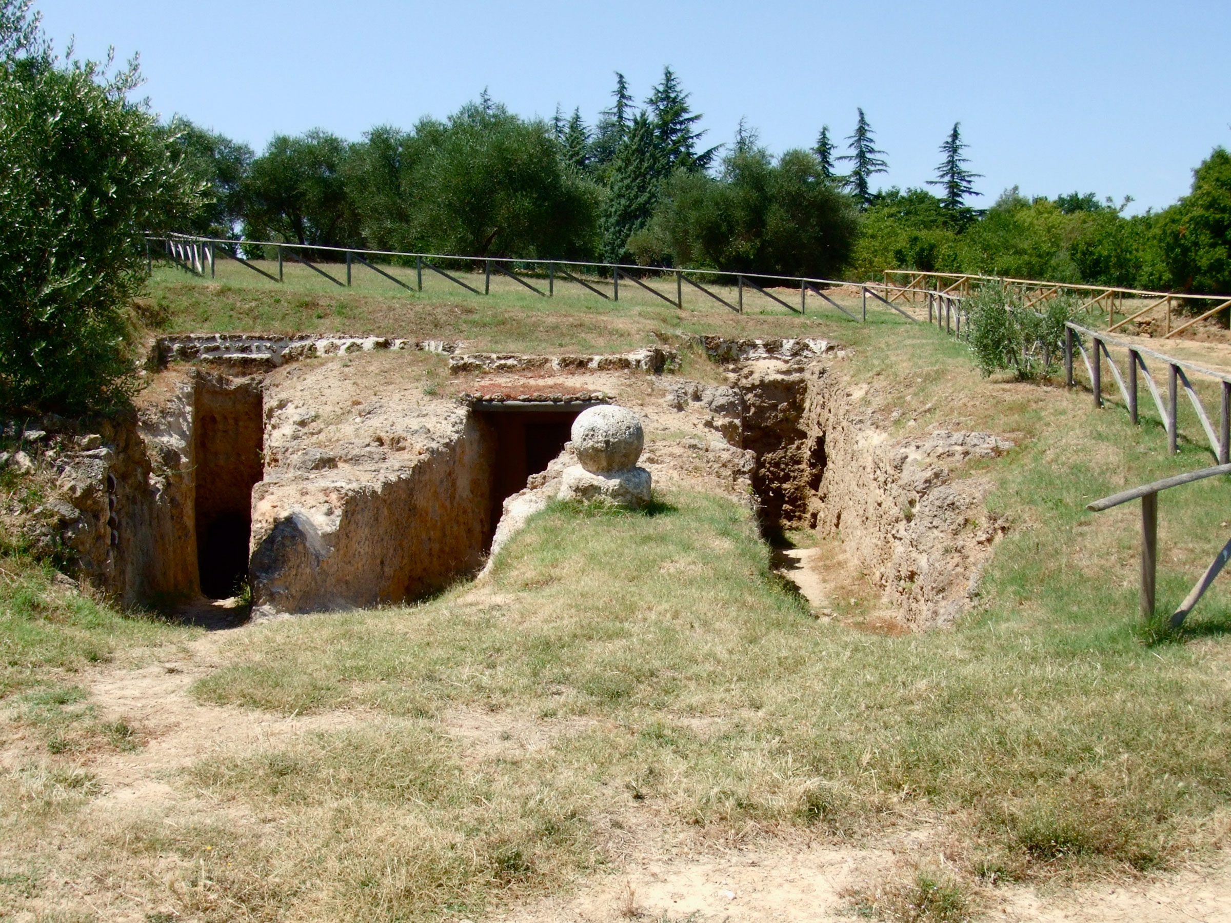 Les 3 dromos avec la tombe du Quadrige infernal au centre avec son cippe